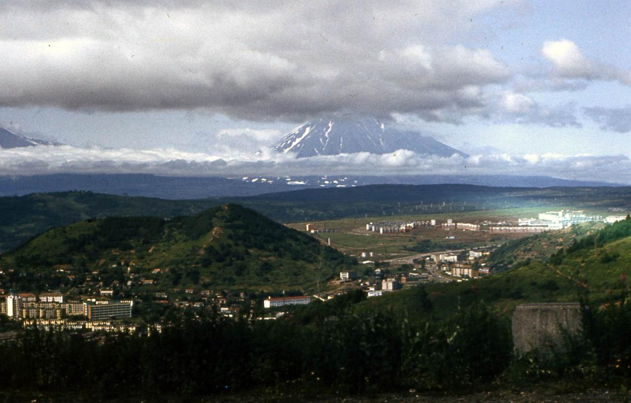 Вид города Петропавловск-Камчатский, на заднем плане Корякский вулкан